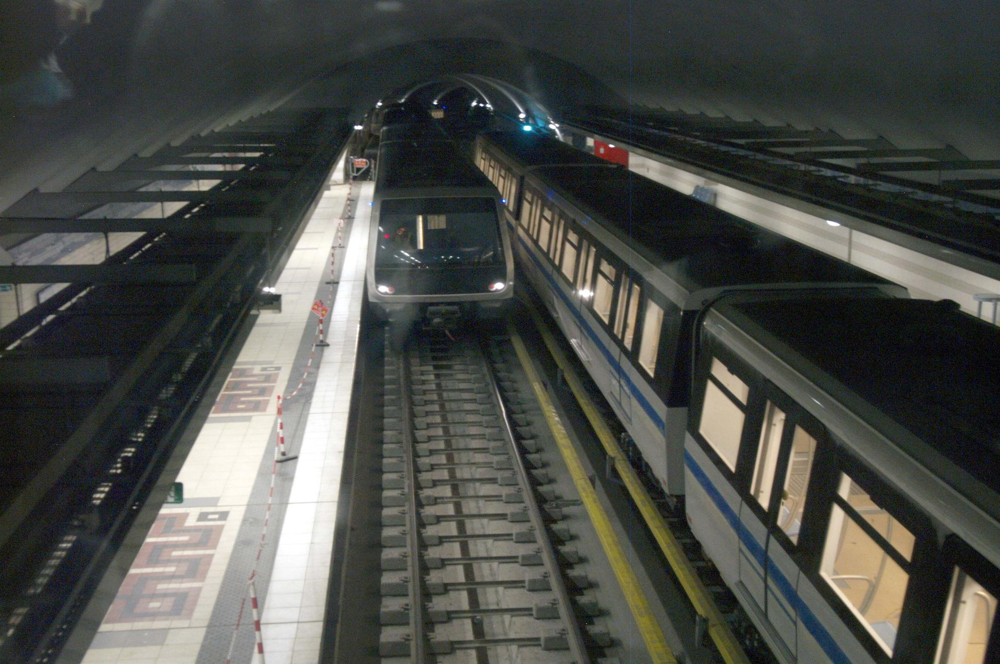 [Lyes Aflou] It took decades of planning to get going, but the Algiers Metro is nearly ready to welcome its first passengers. بعد أكثر من عقدين من التخطيط والتنفيذ، أصبح مترو العاصمة الجزائرية جاهزا لاستقبال أول ركابه Il aura fallu des décennies de planification, mais le métro d'Alger est désormais sur le point d'accueillir ses premiers passagers.